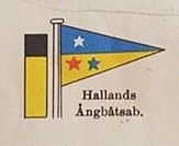 skorstensmärke och rederiflagga för Hallands ångbåts AB.